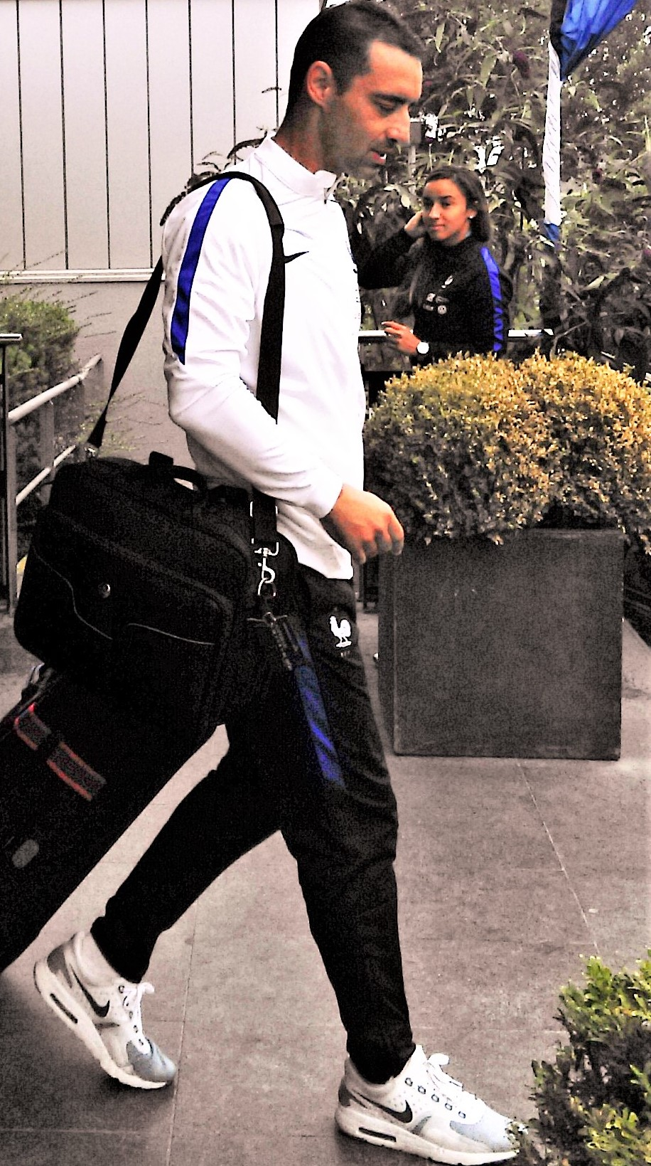 Olivier Echouafni Ende Juli 2017 bei der Frauen-EM in den Niederlanden